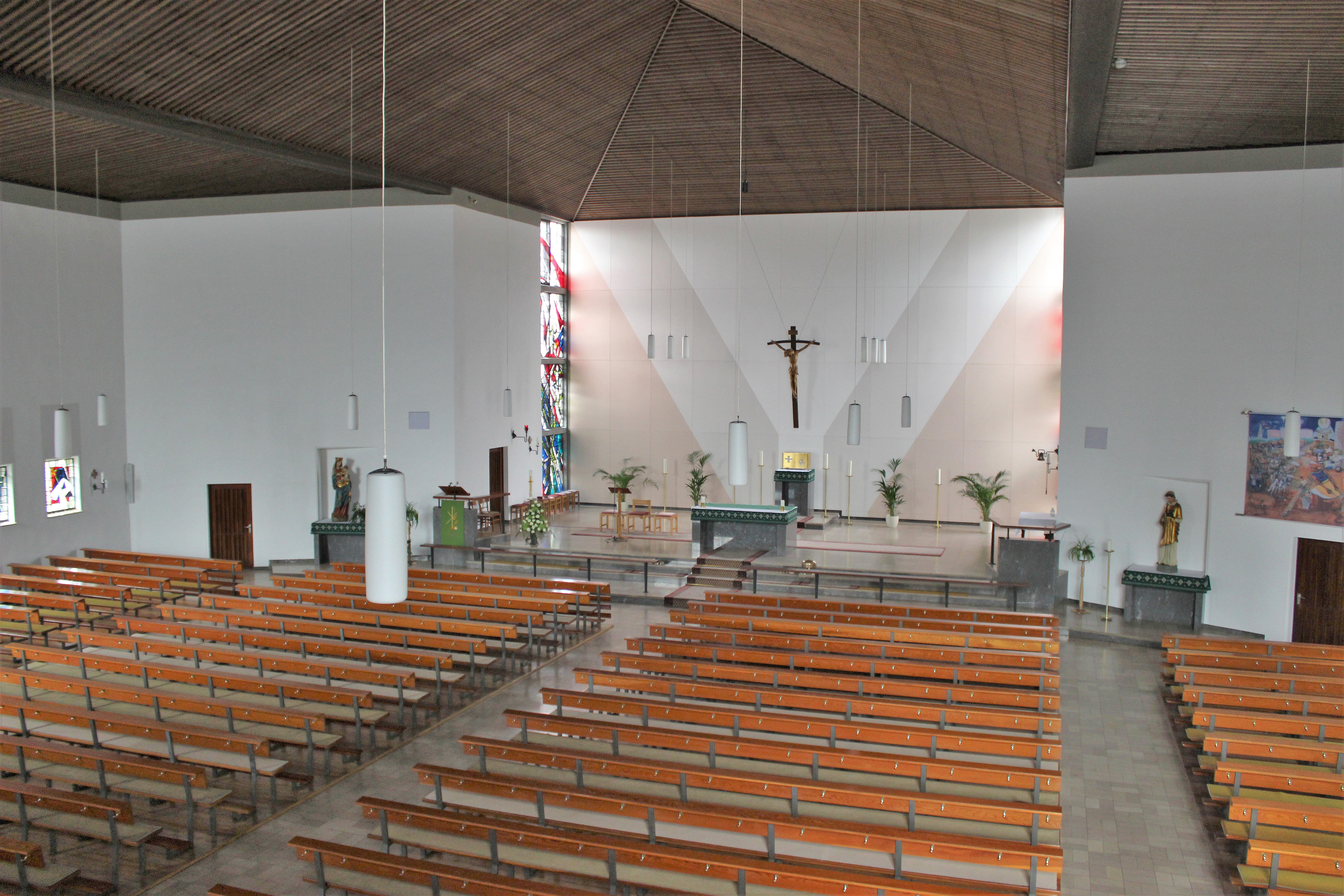 Blick ins Innere der katholischen Pfarrkirche St. Stephanus in Schmelz, Landkreis Saarlouis, Saarland